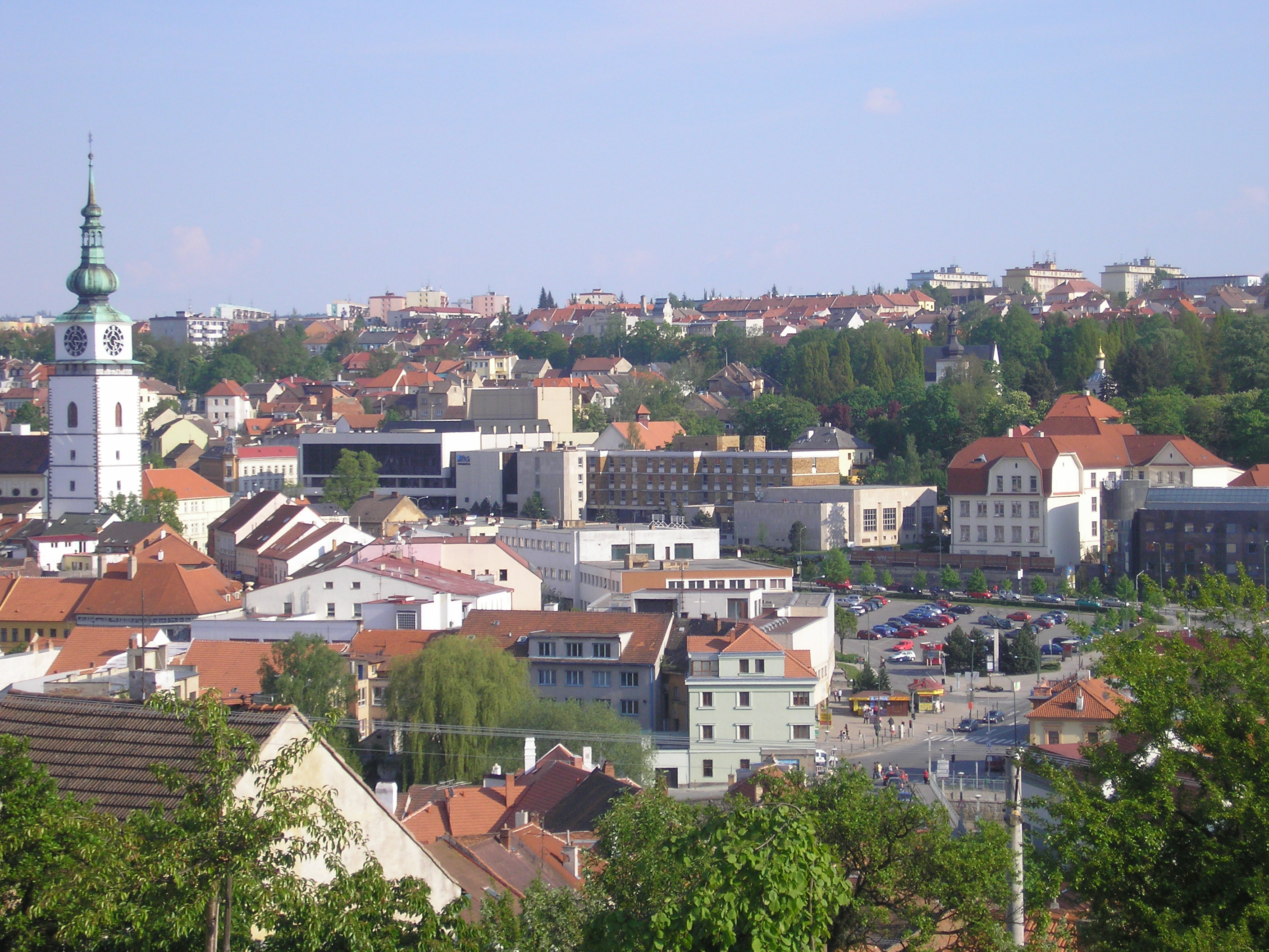 Centre of Třebíč; Třebíč - Vnitřní město